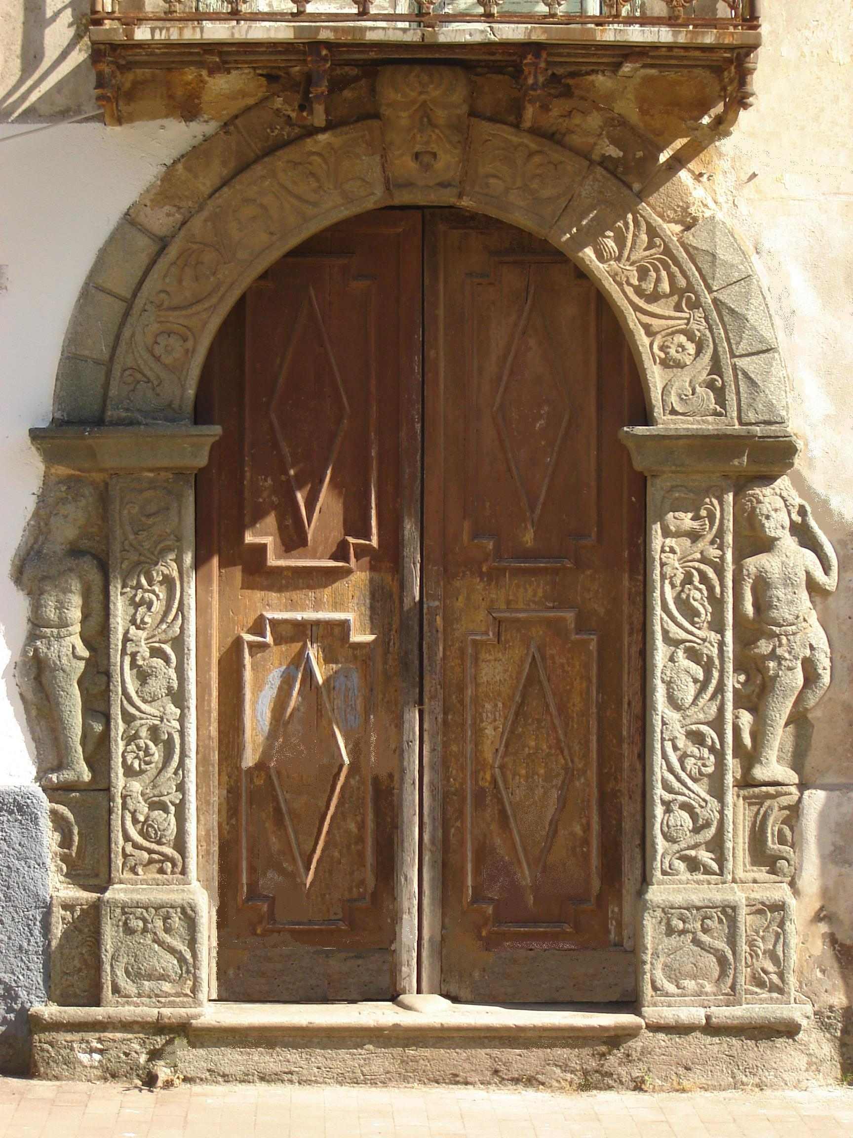 Portale proveniente dalla città medievale sec. XV